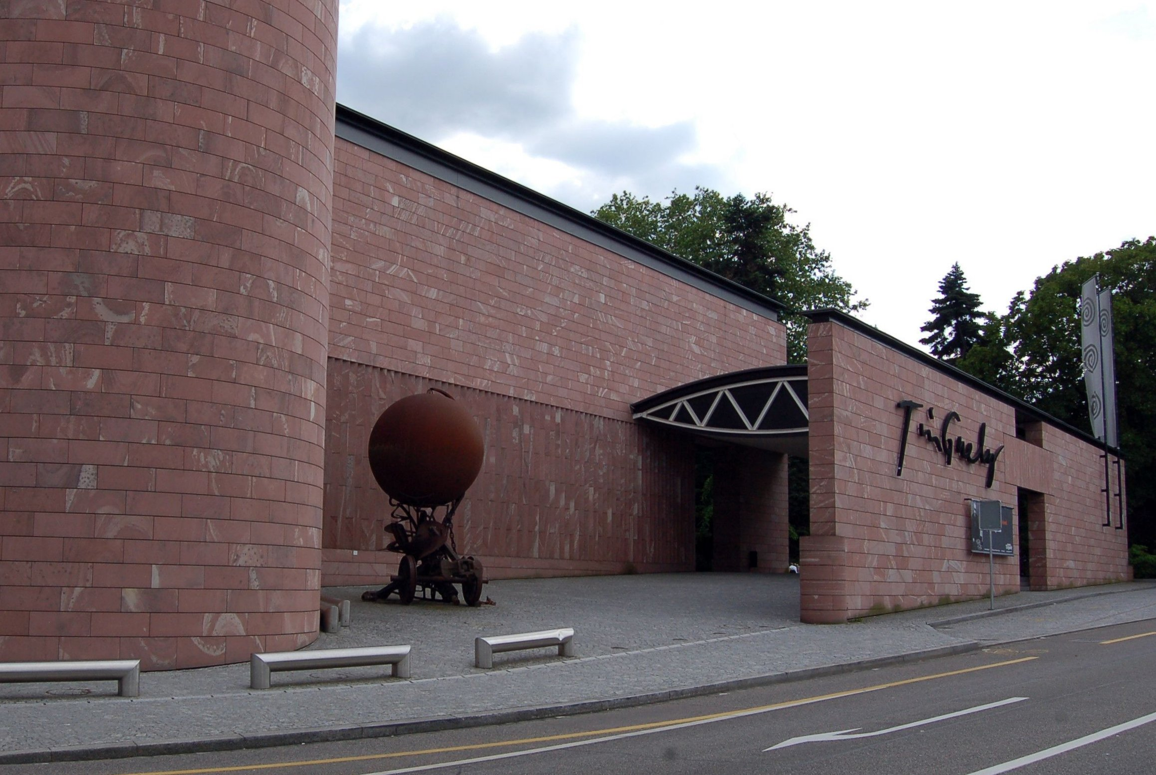 Gebäude des Tinguely Museums